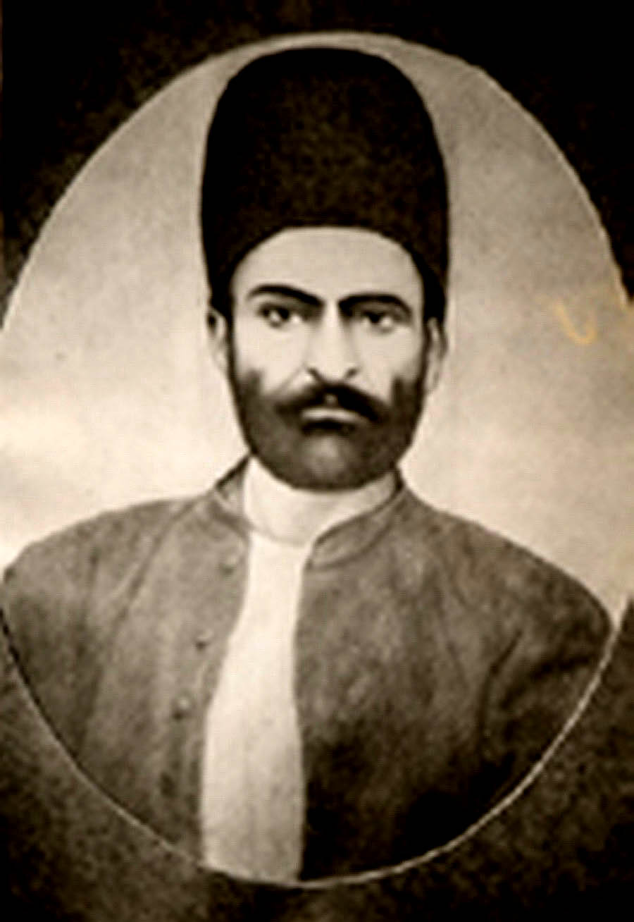 Heydar Gholi Khan Ghiai-e Chamlou